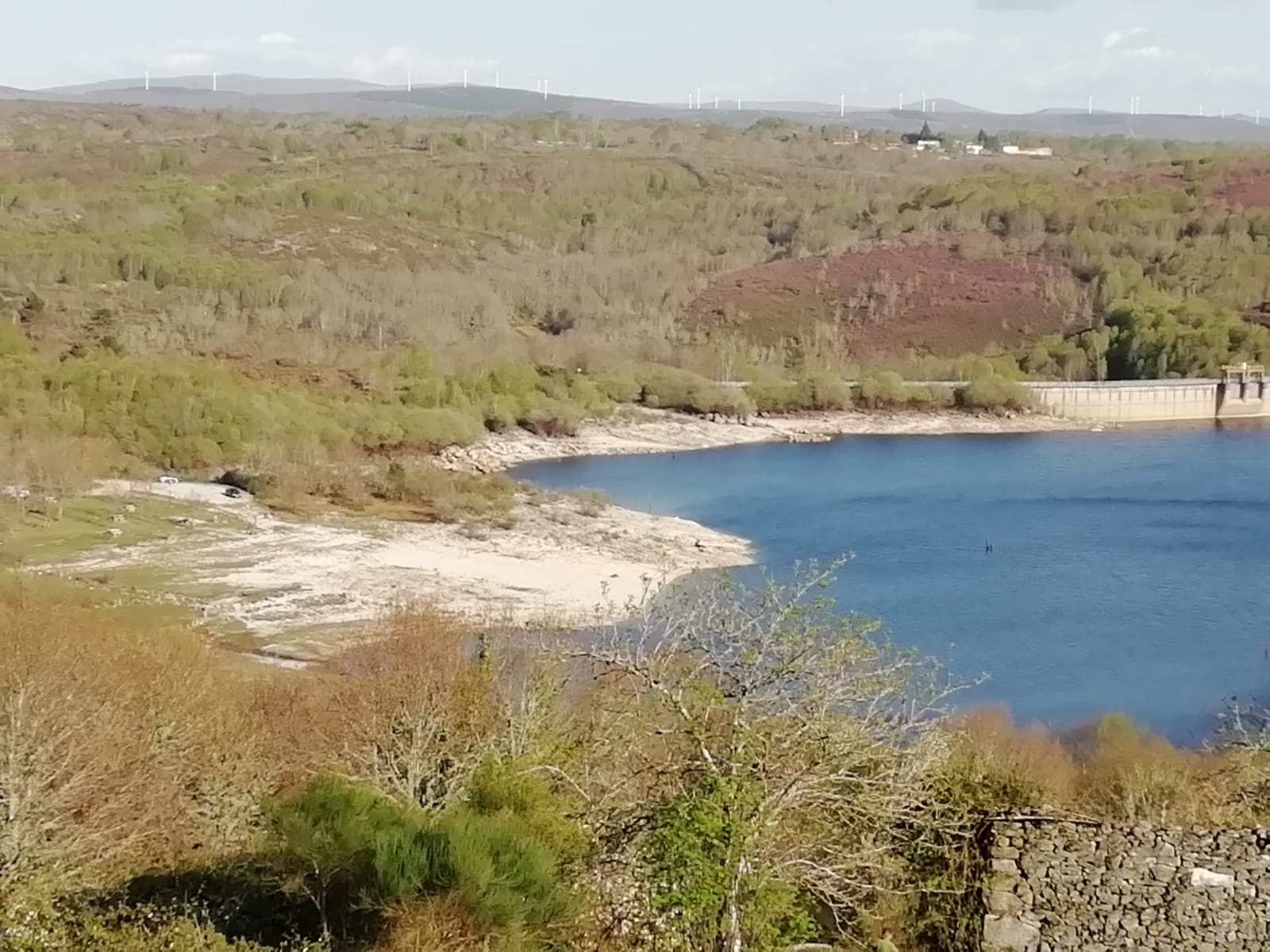 Vista sur do encoro de Edrada